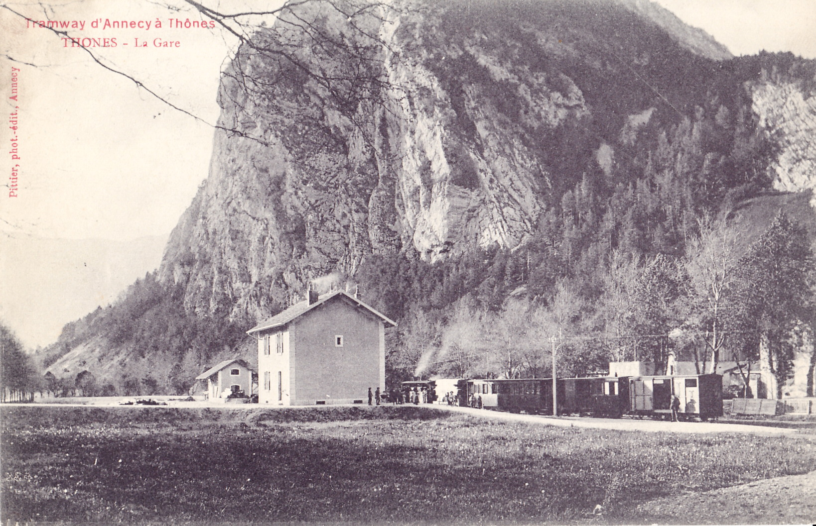 Carte postale ancienne éditée par Pittier à Annecy, collection Tramway d'Annecy à Thônes :THÔNES - La Gare